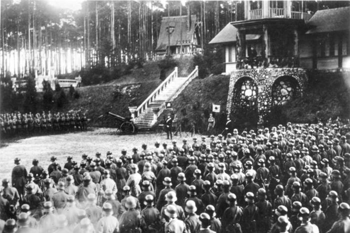 ADN-ZB/Archiv Das konterrevolutionäre Freikorps "Lützow" feiert in Zossen den Jahrestag seines Bestehens im Jahre 1920 [Scherl Bilderdienst]